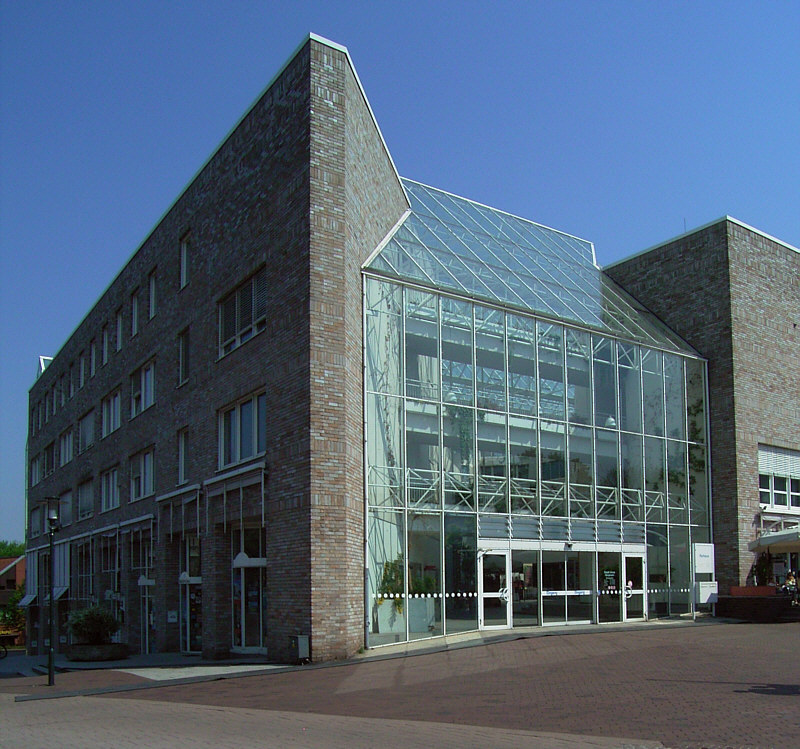 Rathaus Unna, Eingangsbereich